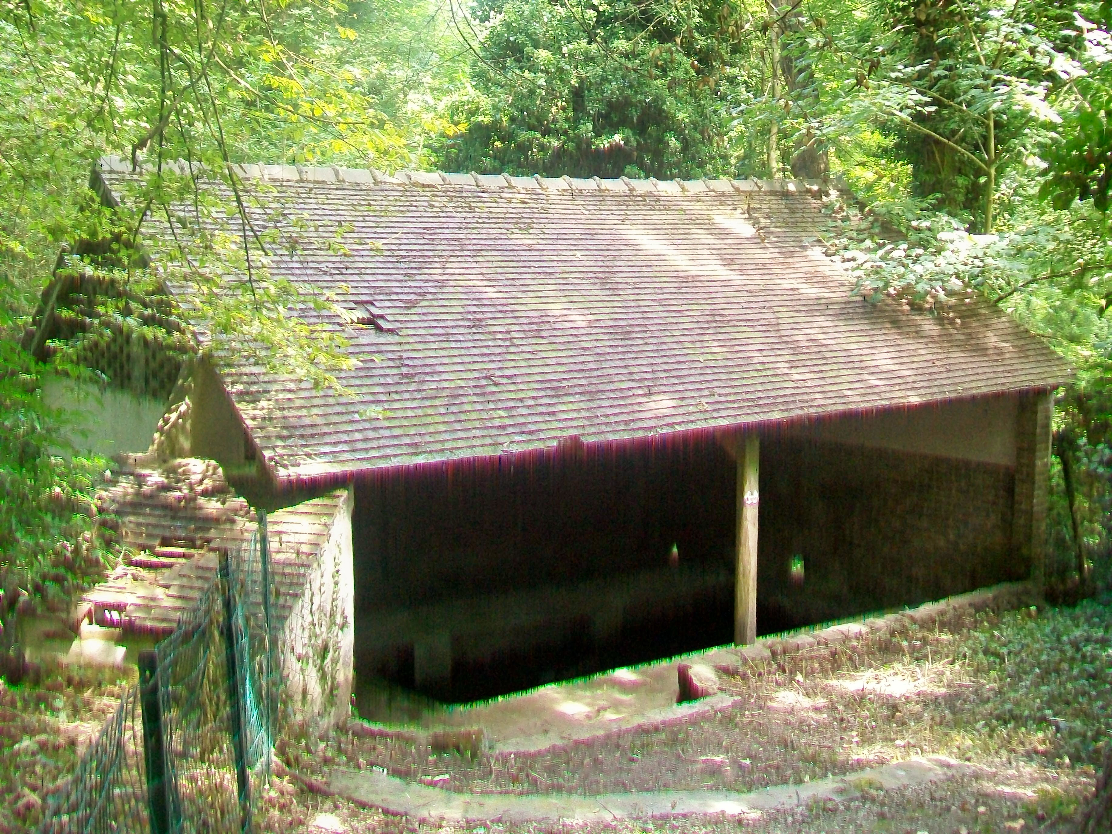 Le lavoir de Jouy-le-Comte, au bout d'une courte impasse depuis la rue du maréchal Joffre, à peu de distance au nord de l'église. Ce lavoir est alimenté par une source.